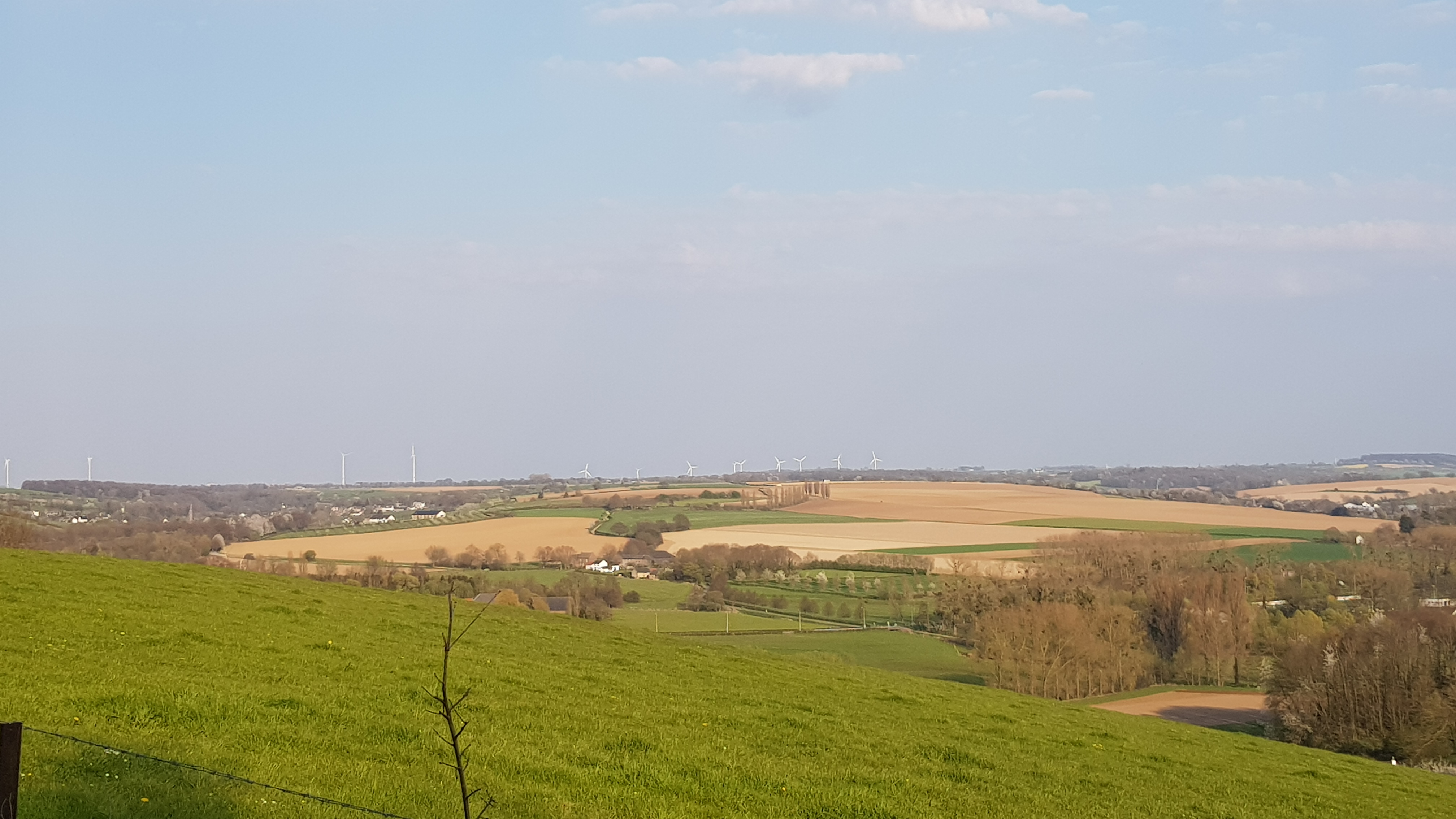 Kruisberg bij Wahlwiller, Nederland